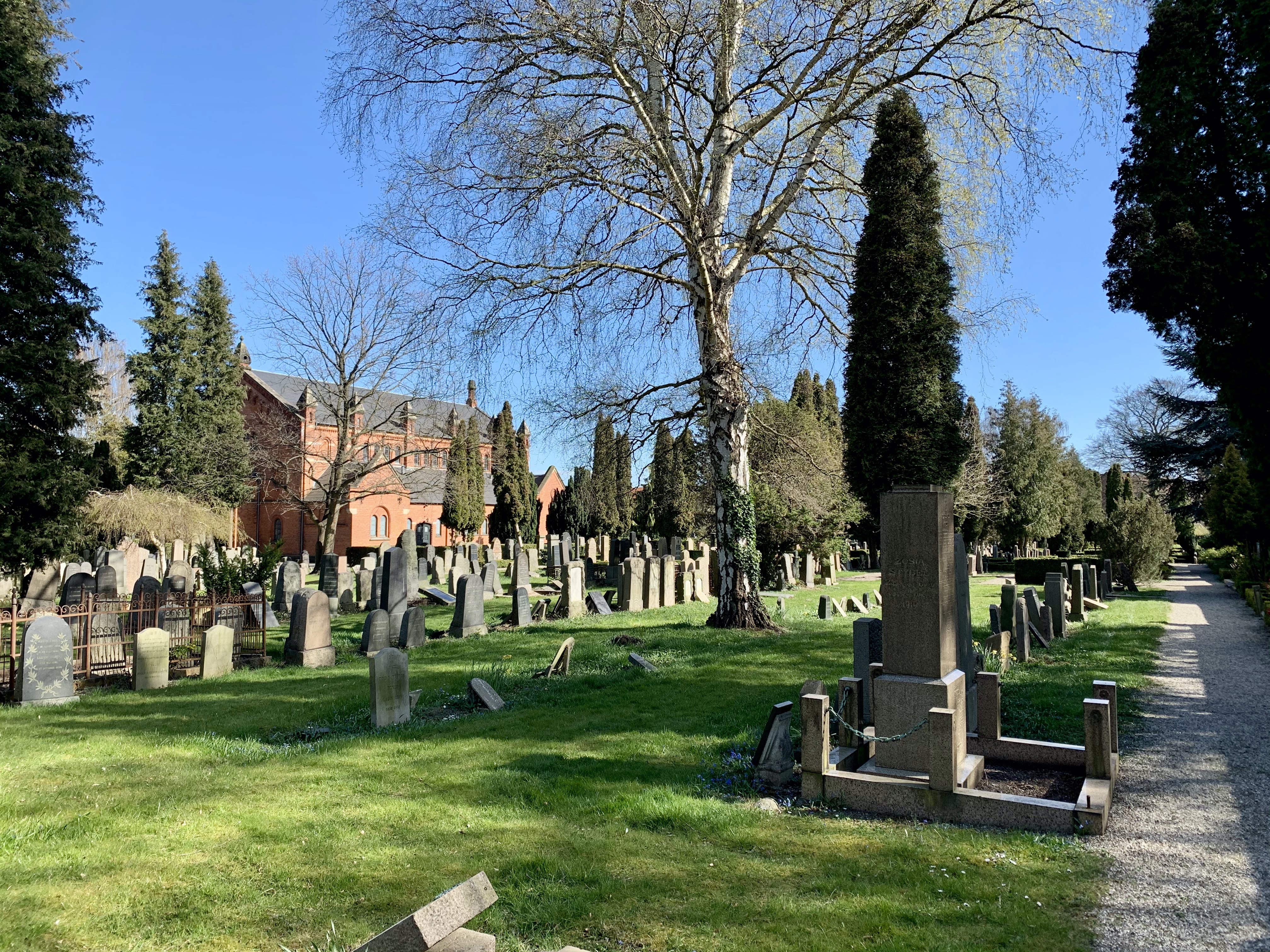 Mosaisk Vestre Begravelsesplads